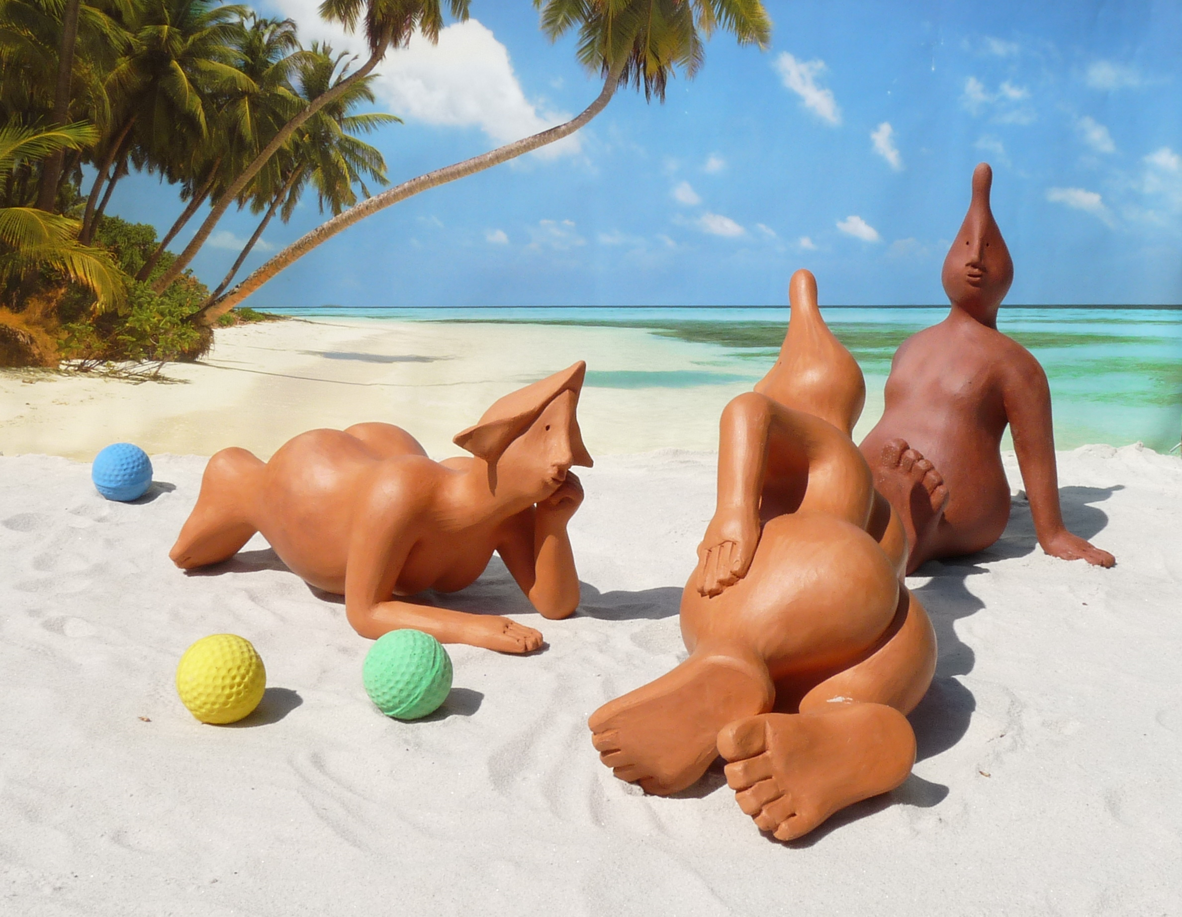 Je me souviens très bien ! C’était en 2009 ! Nous étions partis tous les 4 (moi et 3 amis maghiens) en vacances au Costa Rica pour nous octroyer quelques jours de vacances. Nous jouions au ballon quand j’ai décidé de prendre une photo dans ce décor de rêve. De quoi faire de celui-ci une réalité !